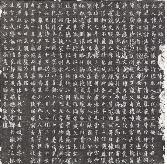 中文（台灣）: 《唐左光祿大夫江國公陳叔達夫人王氏墓誌》